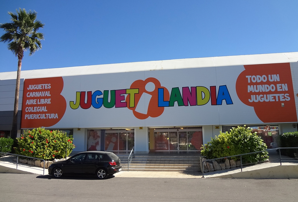 Fachada San Juan Juguetilandia